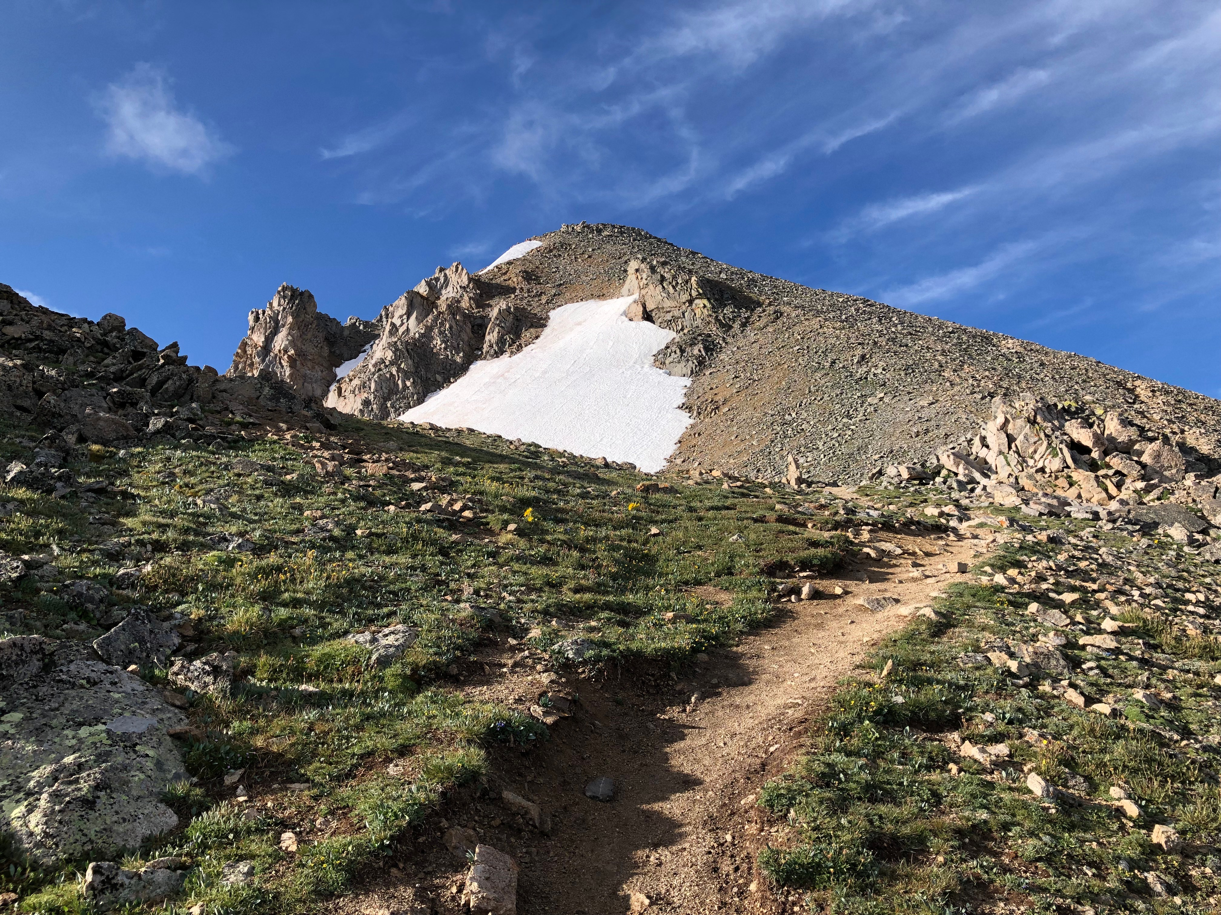 Huron Peak